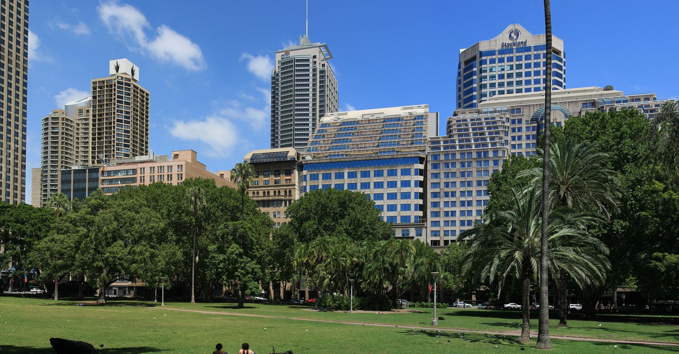 Hyde Park Sydney